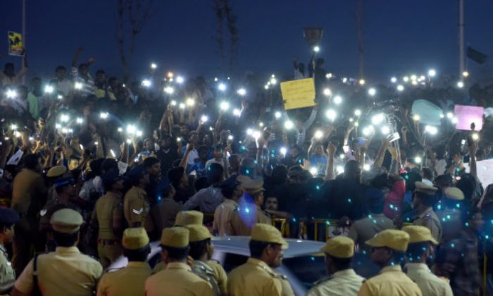 ஜல்லிக்கட்டு மெரீனா புரட்சி